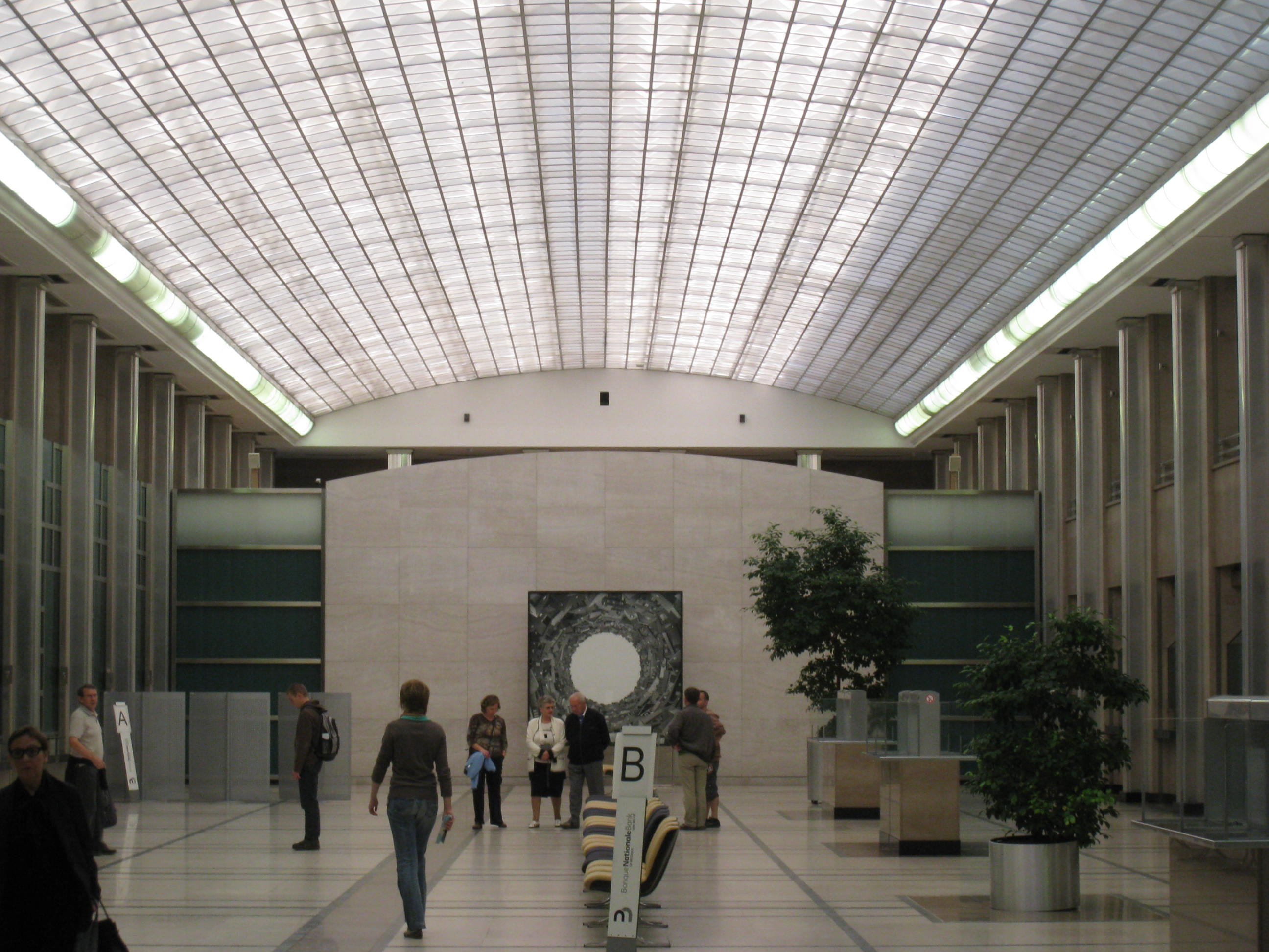 Hall Van Goethem, Nationale Bank van België, Brussel